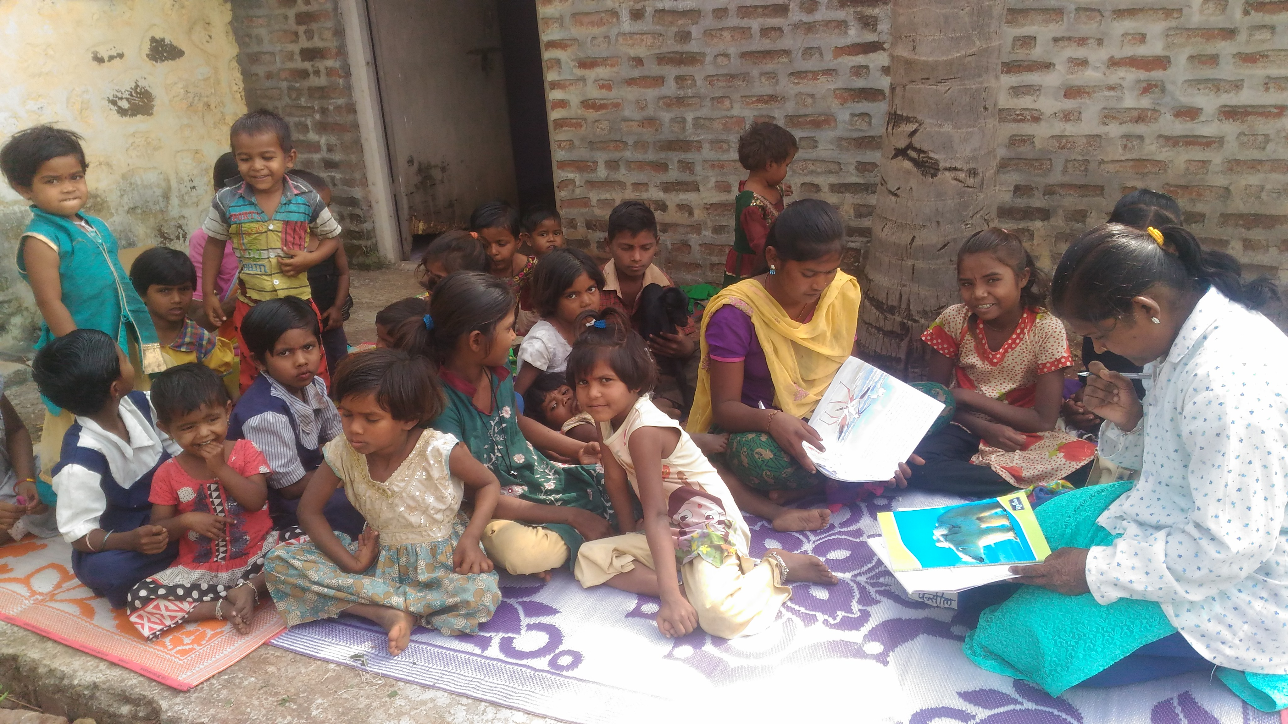 ऊस तोड मजूरांच्या मुलांसाठी चालवलेली शाळा